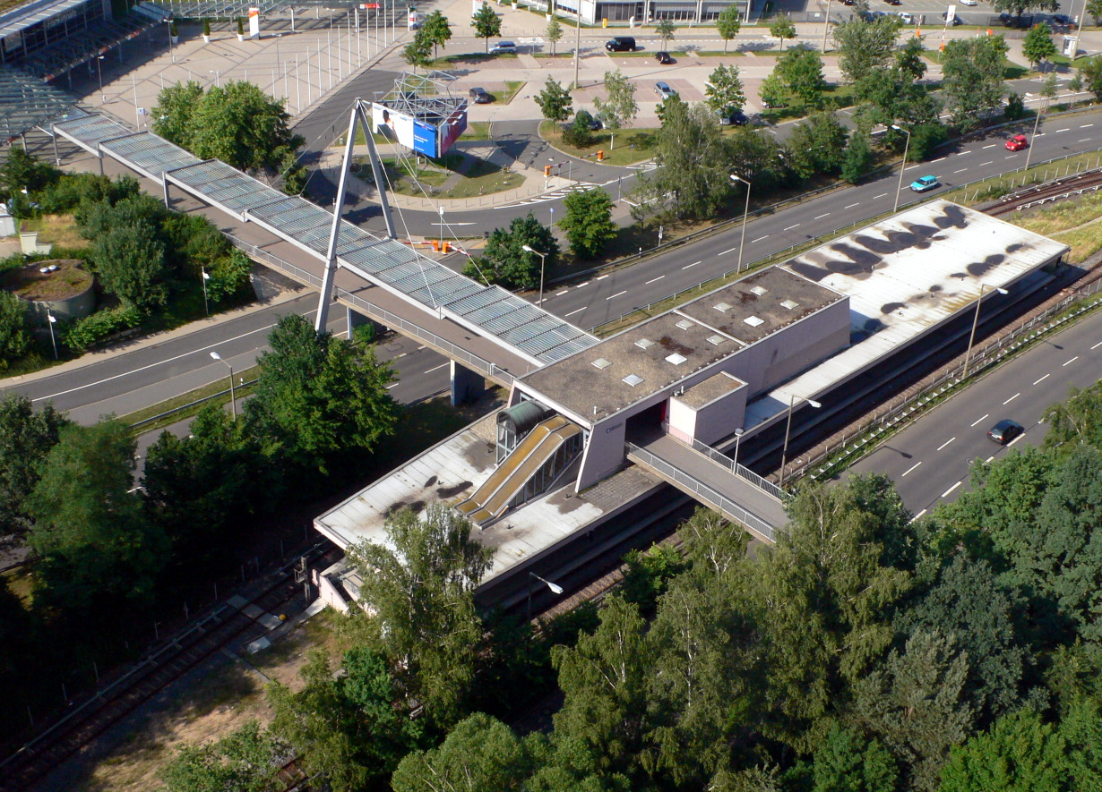 U-Bahnhof Messe der U-Bahn Nürnberg, Außenansicht, Blick von Süden